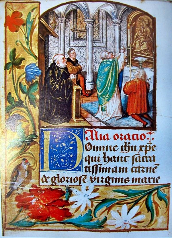 Miniatur aus dem Gebetbuch des Abtes Konrad Mörlin von St. Ulrich und Afra, Augsburg, fol. 33v, Budapest, Széchényi-Nationalbibliothek, Cod. lat. 309